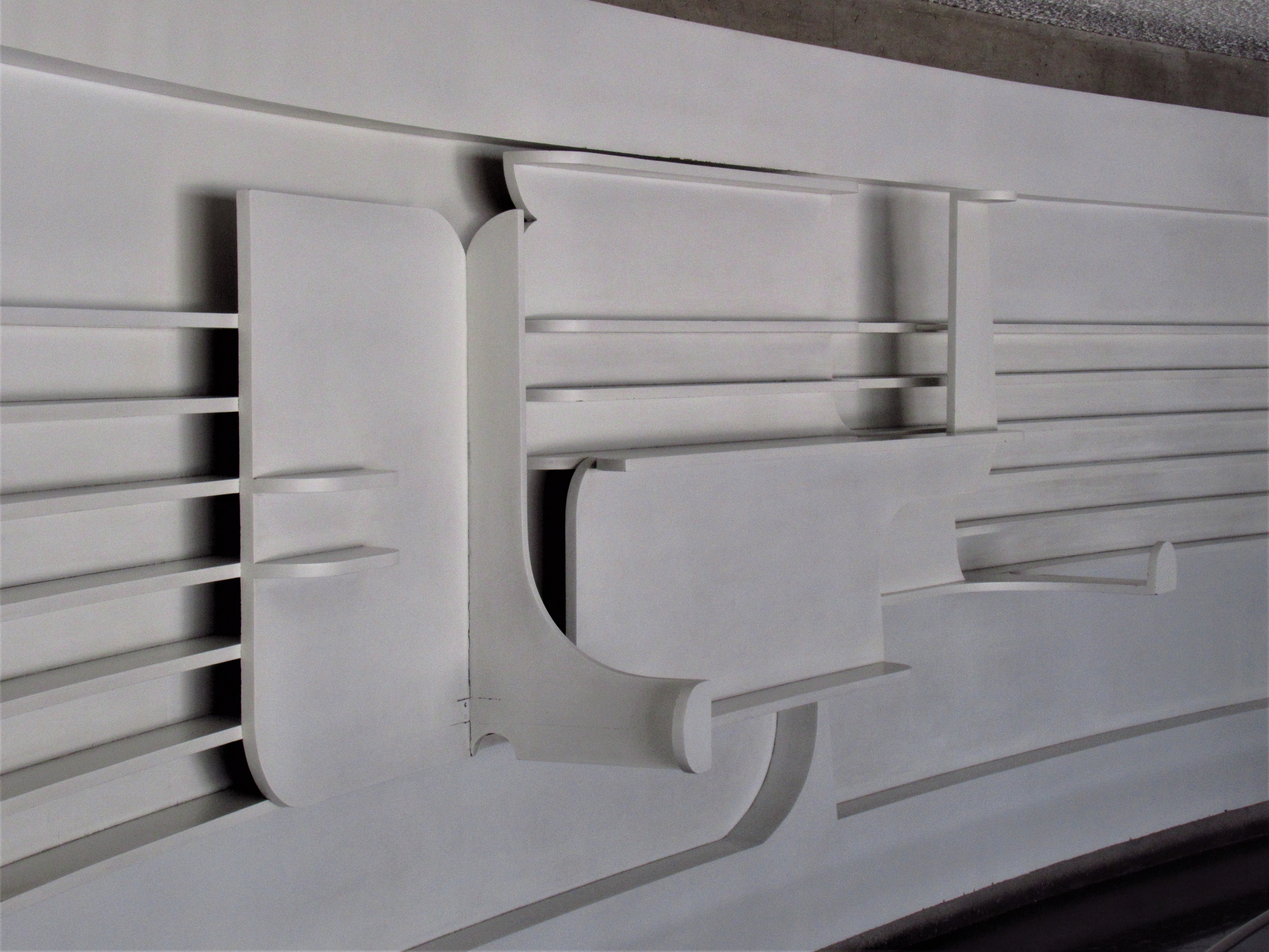 Mural horizontal, relieve de Eduardo Ramírez Vilamizar en la Biblioteca Luis Ángel Arango